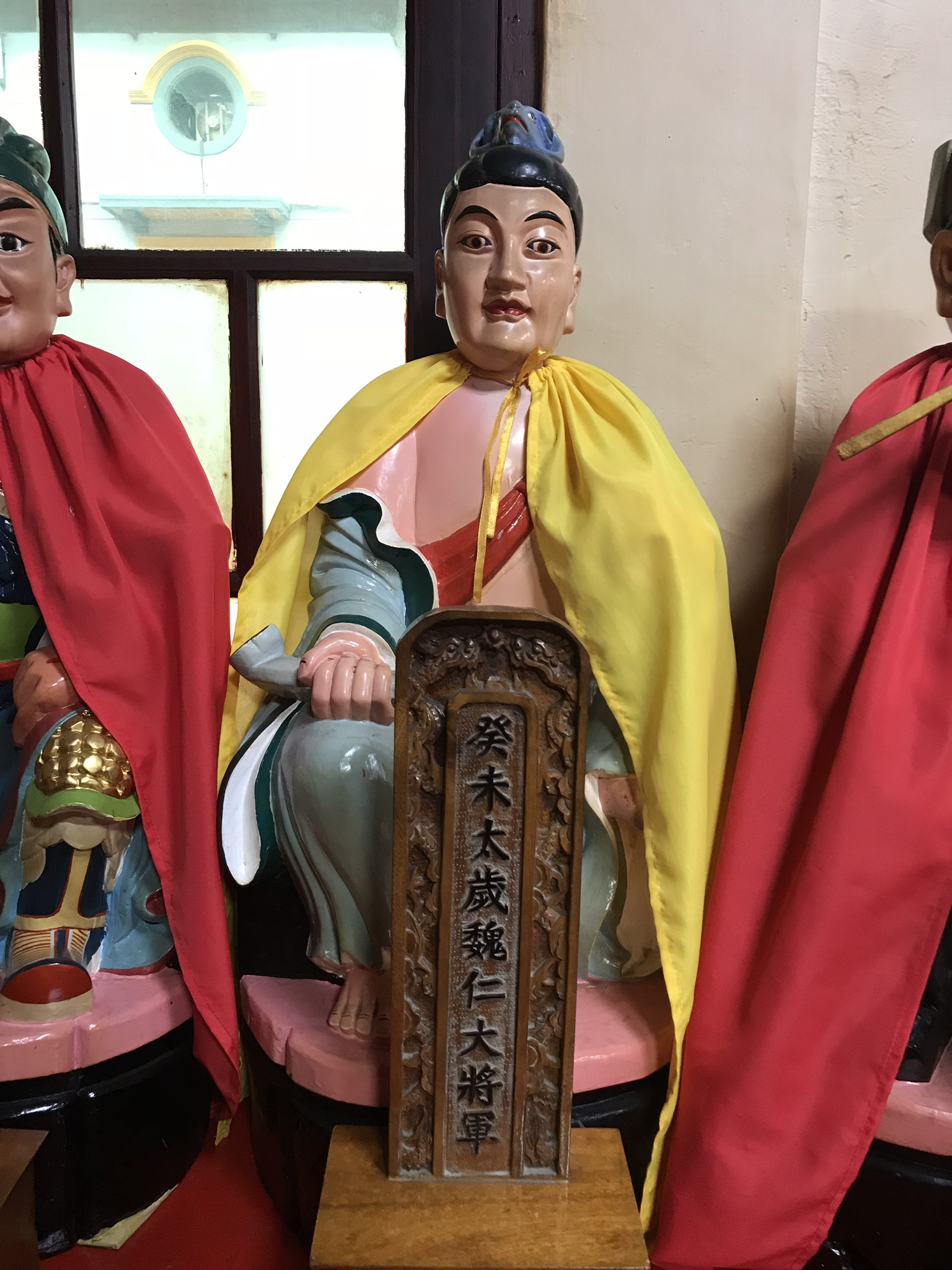 癸未太歲魏仁大將軍神像